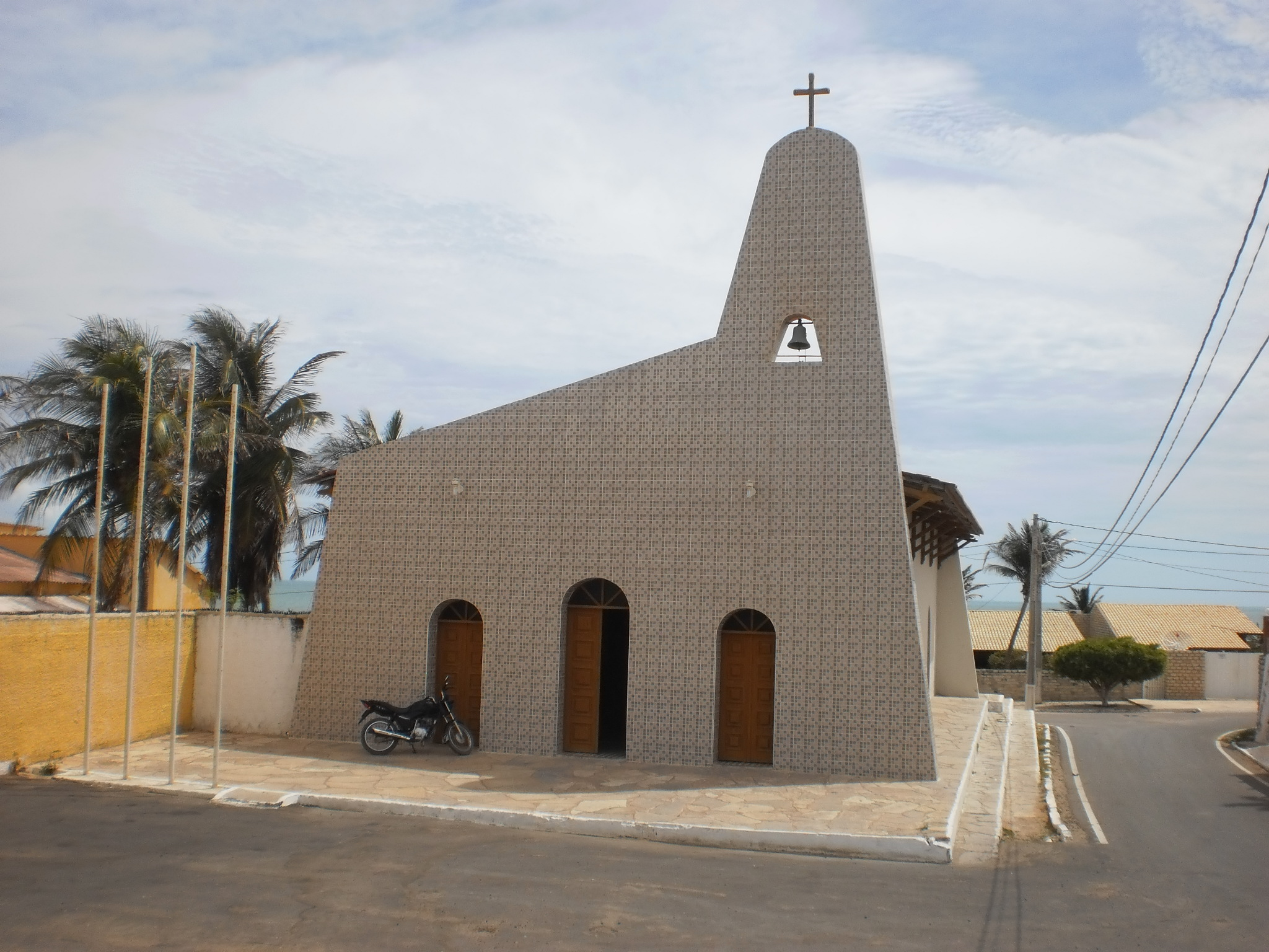 Igreja Matriz de Tibau, Rio Grande do Norte, Brasil.